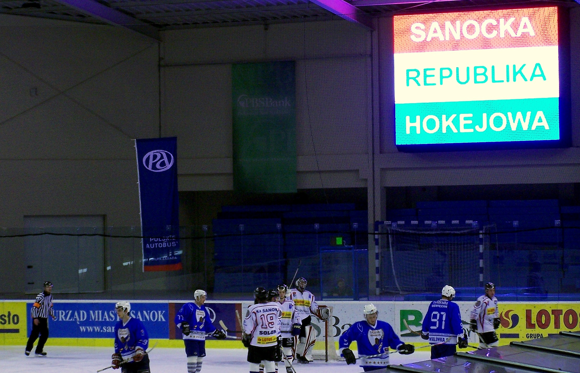 Sanocka Republika Hokejowa (telebim na Arenie Sanok) podczas meczu KH Sanok - Unia Oświęcim (6:2) 14 stycznia 2007.